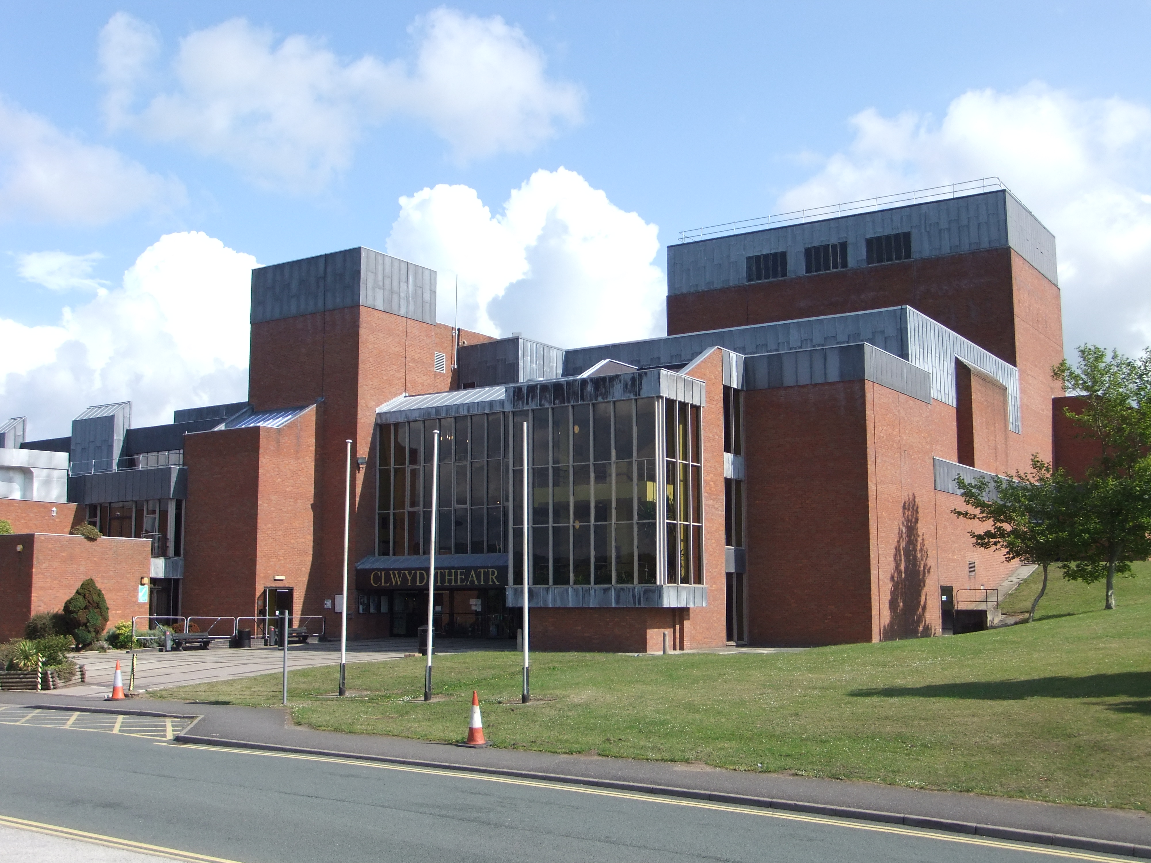 Clwyd Theatr Cymru, Mold, Flintshire, Wales.